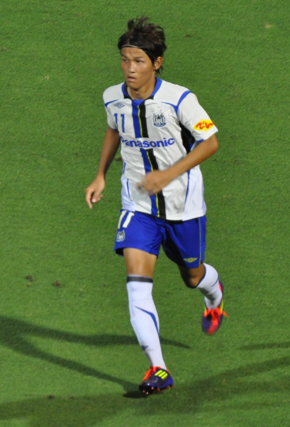 2011.07.10 Omiya Ardija 2-3 Gamba Osaka_175